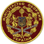 Нарукавний знак, Міністерство оборони України, Сухопутні війська